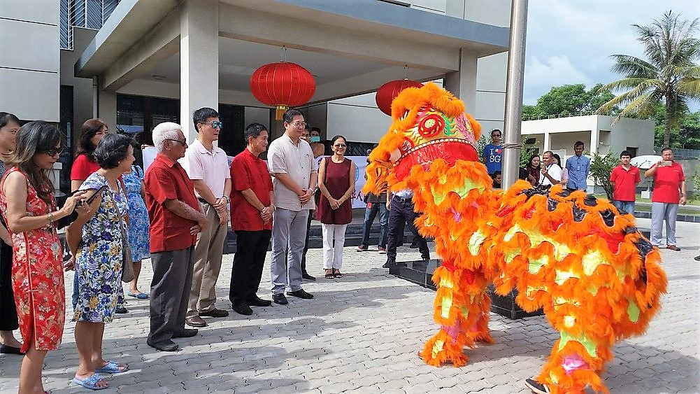 Chinesisches Neujahr, chinesische Botschaft in Dili, Osttimor